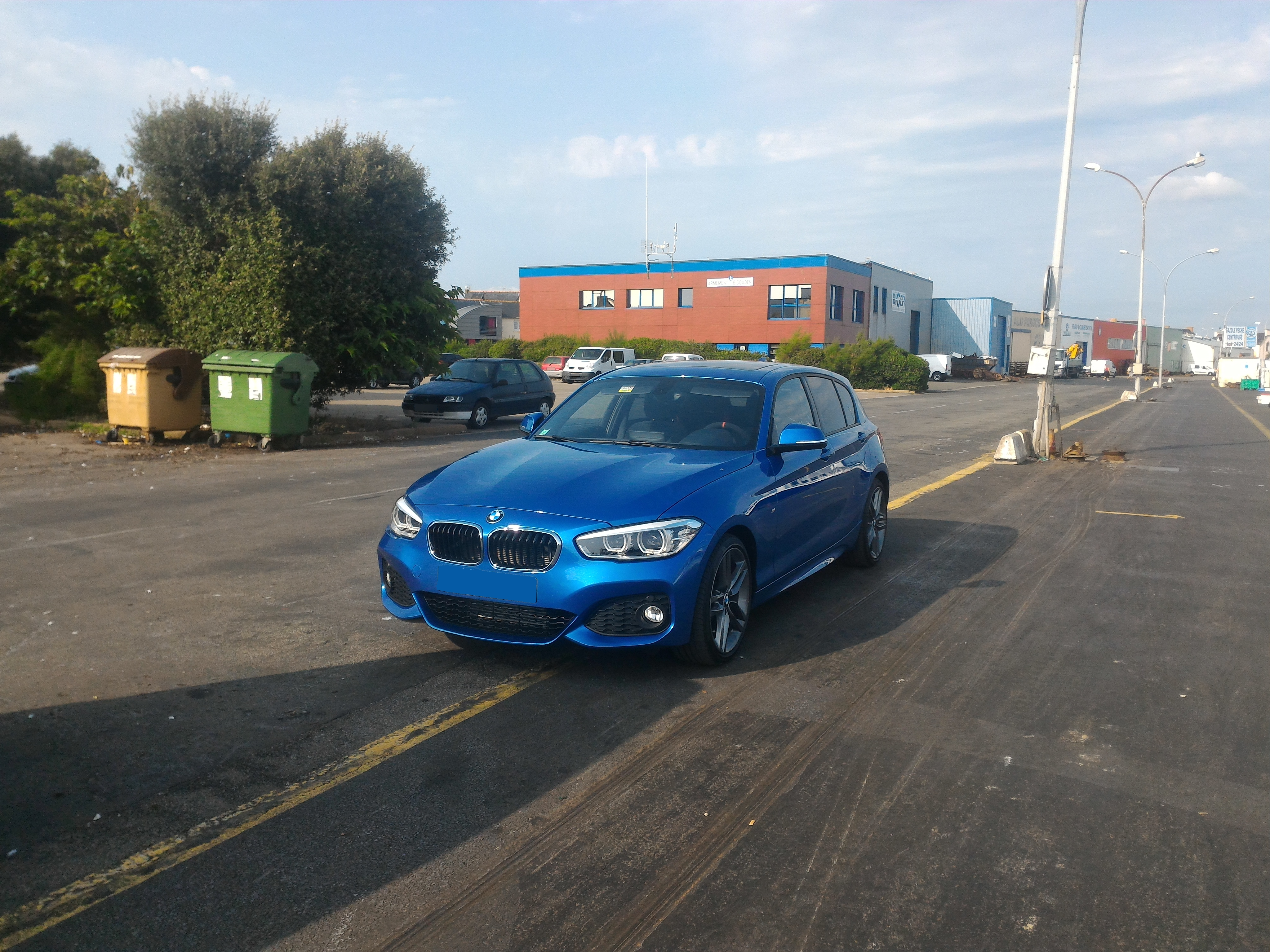 BMW Série 1 118d (F20) avec le pack M Sport - restylage de 2015